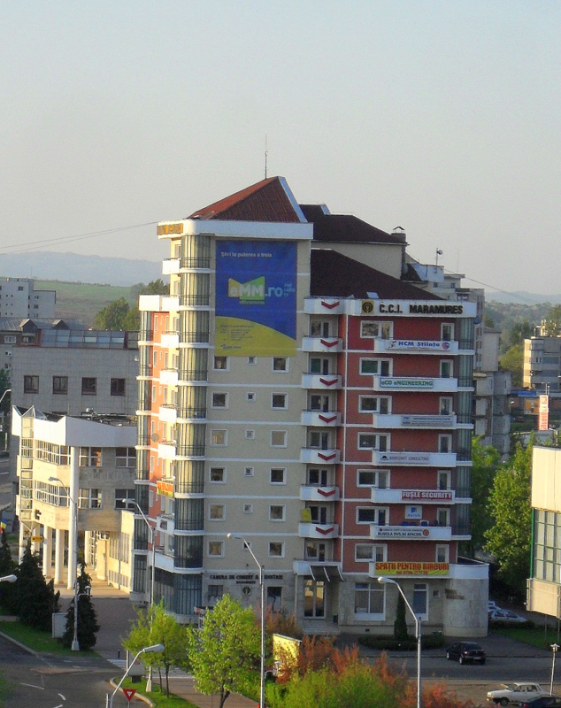 Baia Mare